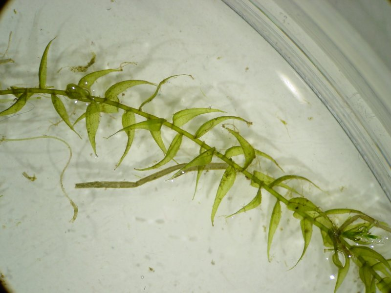 Wassermoos Drepanocladus aduncus